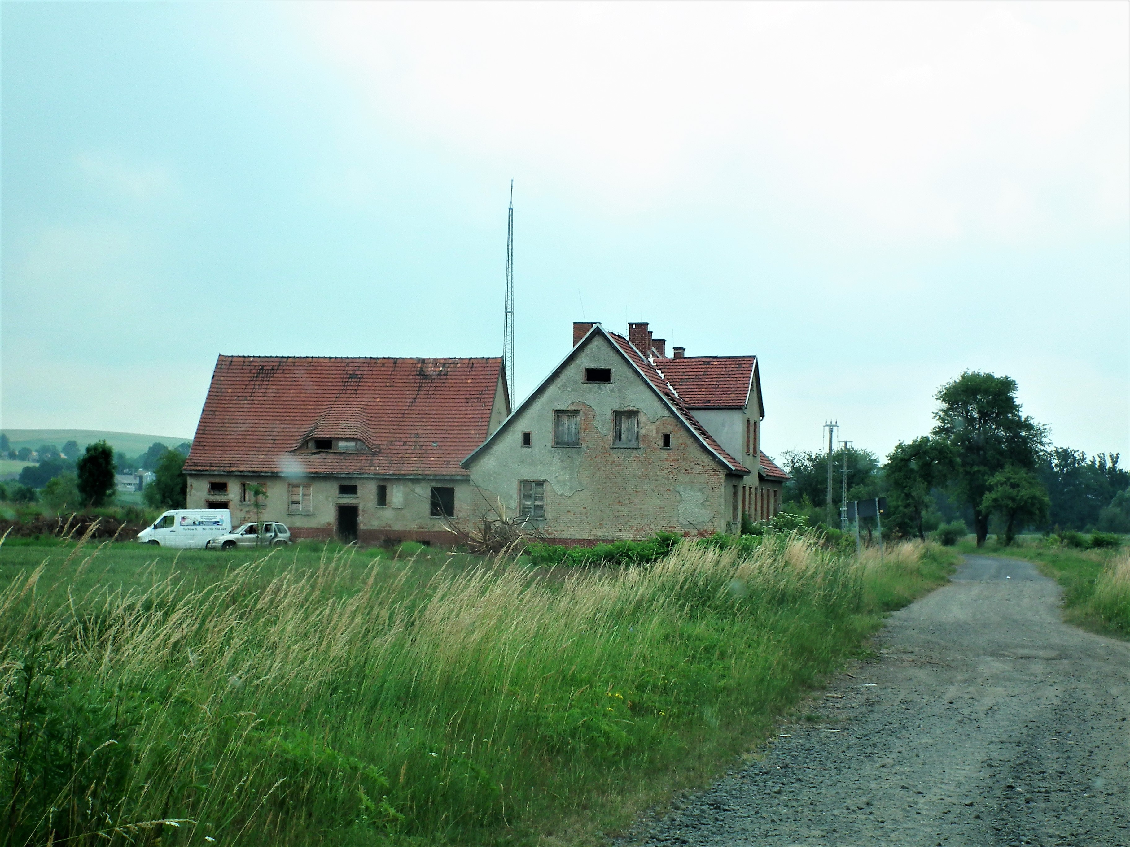 B. strażnica WOP w Bliszczycach.